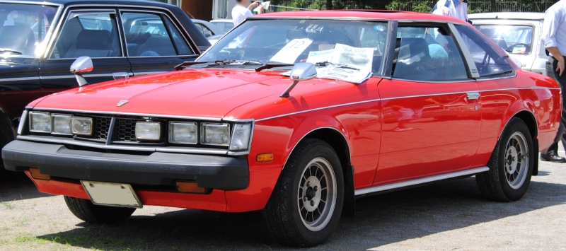 Toyota Celica Coupe